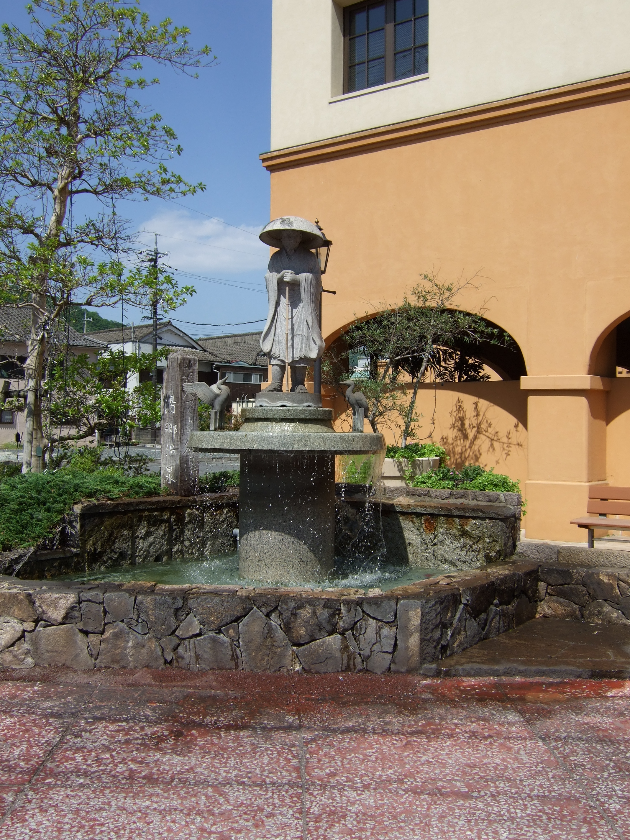 円仁湯郷